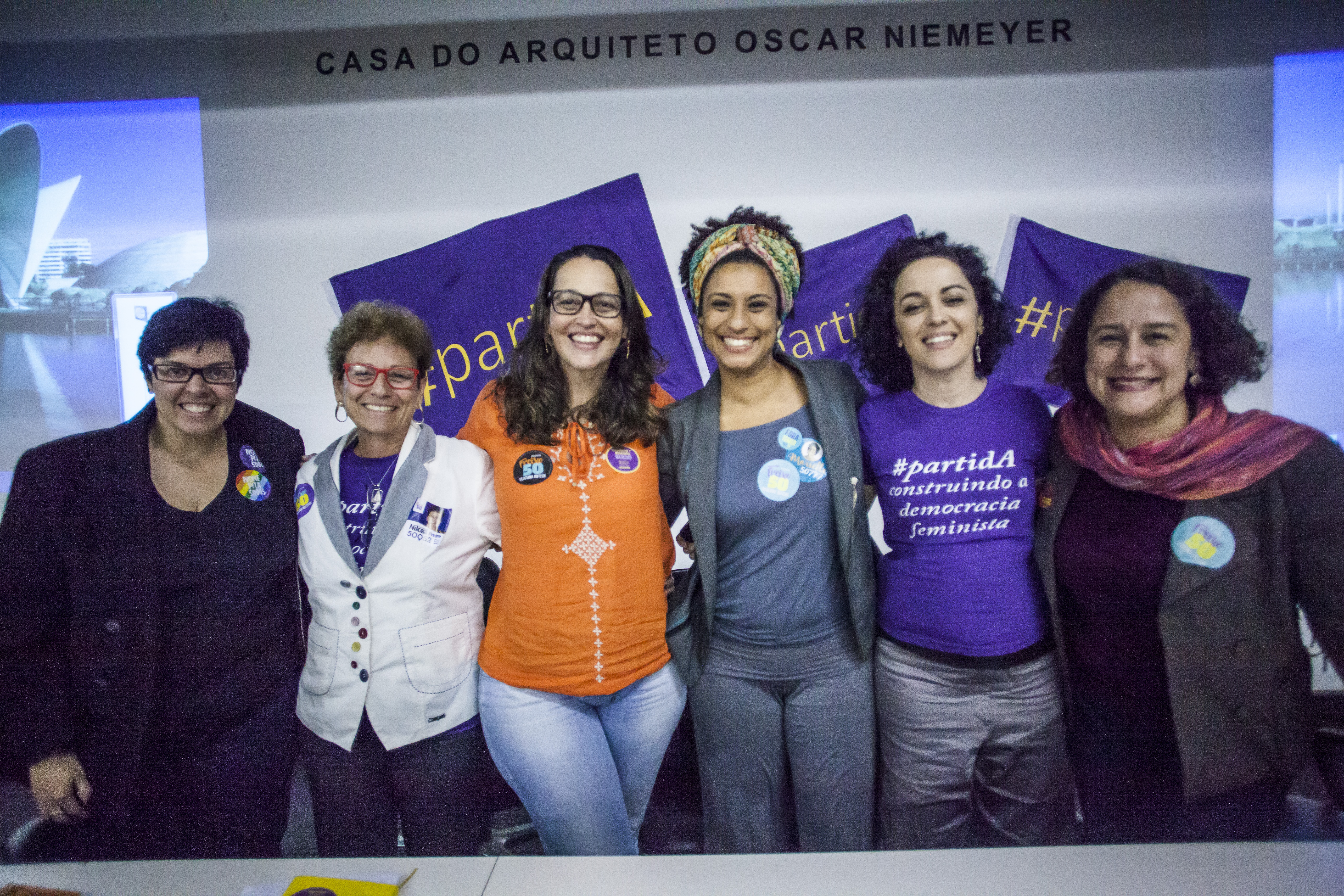 Luciana50 • Debate PartidA com Luciana Boiteux • 22/09/2016